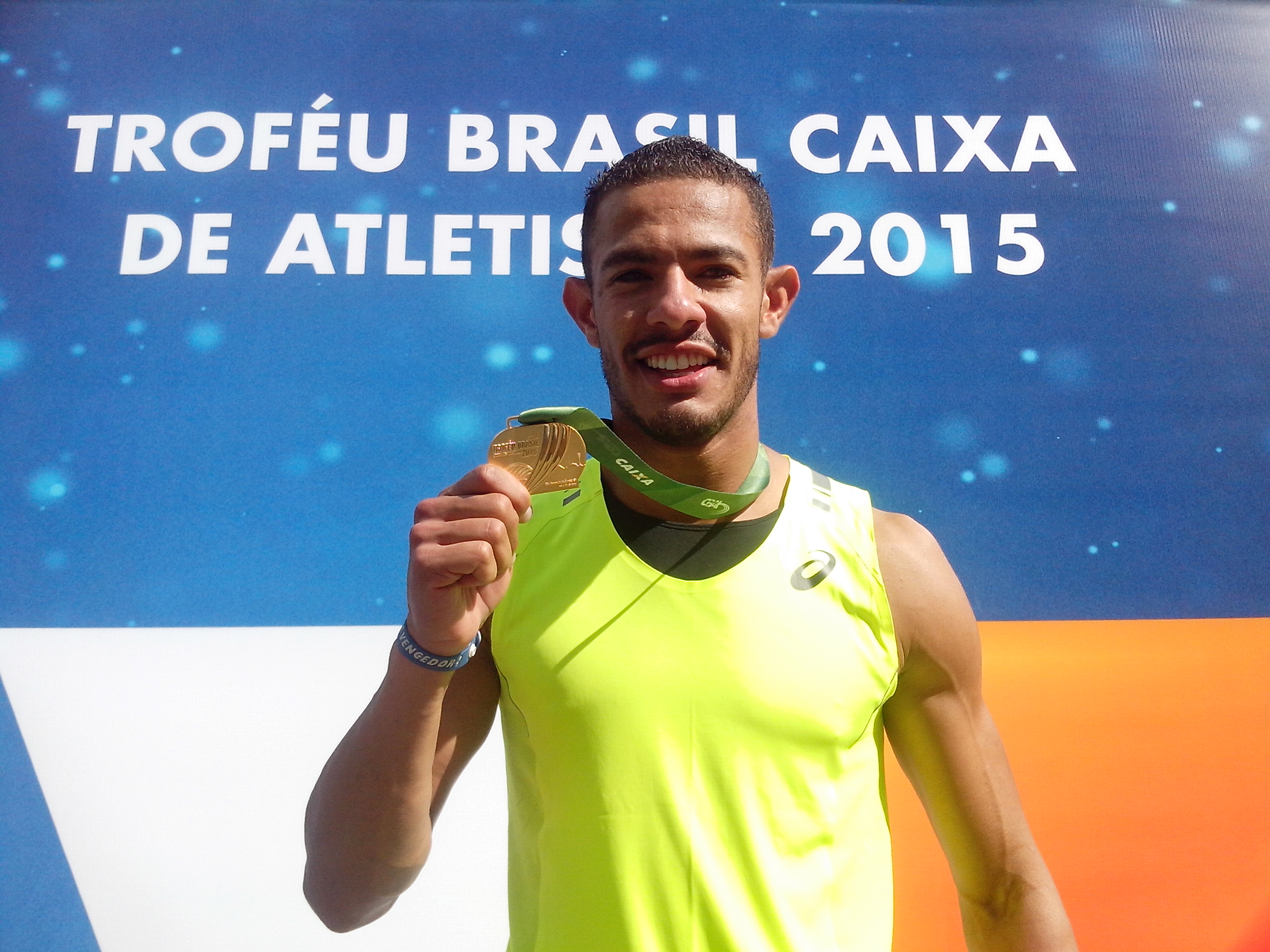 XXXIV Troféu Brasil CAIXA de Atletismo 14 a 17 de Maio de 2015 São Bernardo do Campo - SP